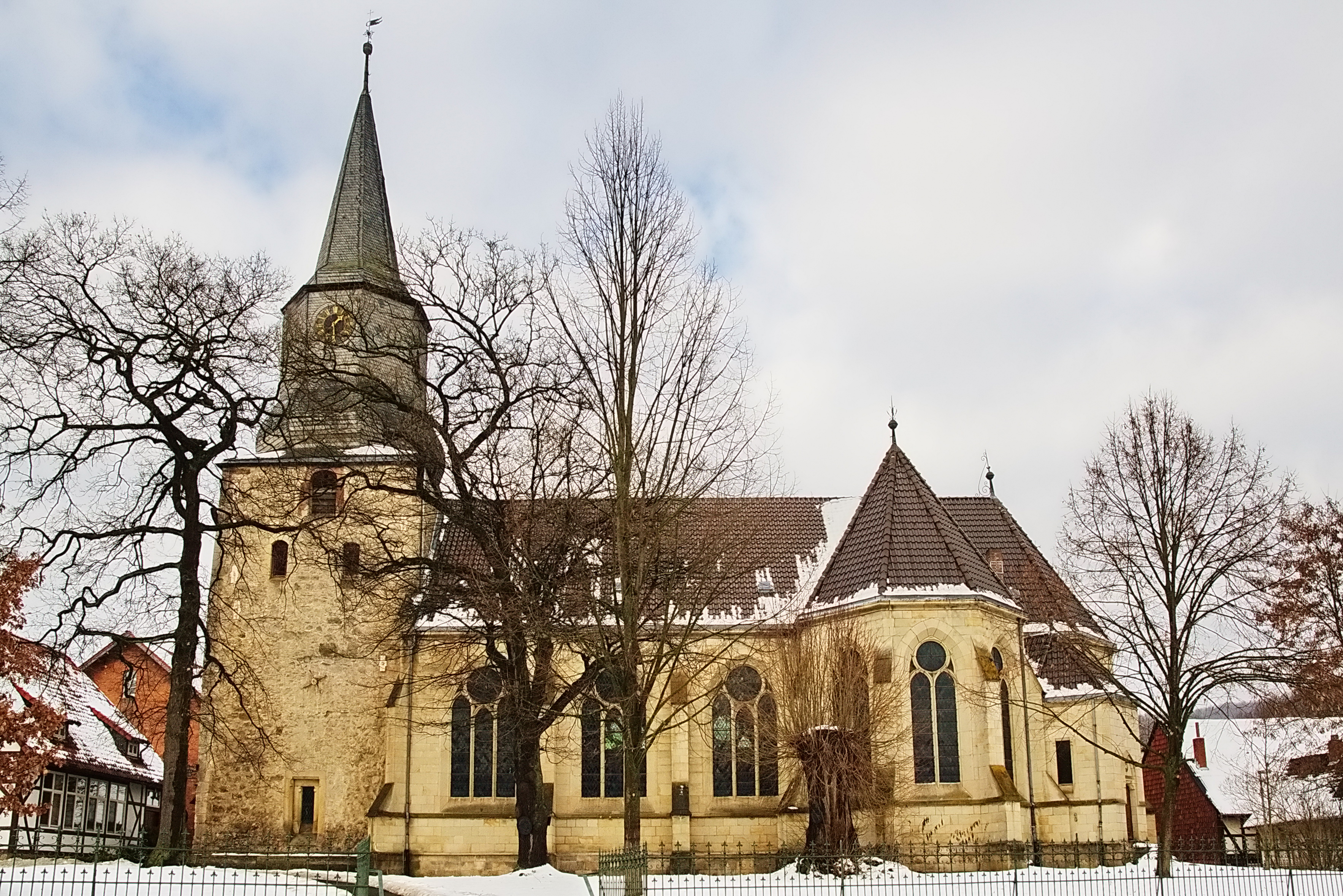 St. Georgs-Kirche in Delligsen, Niedersachsen, Deutschland